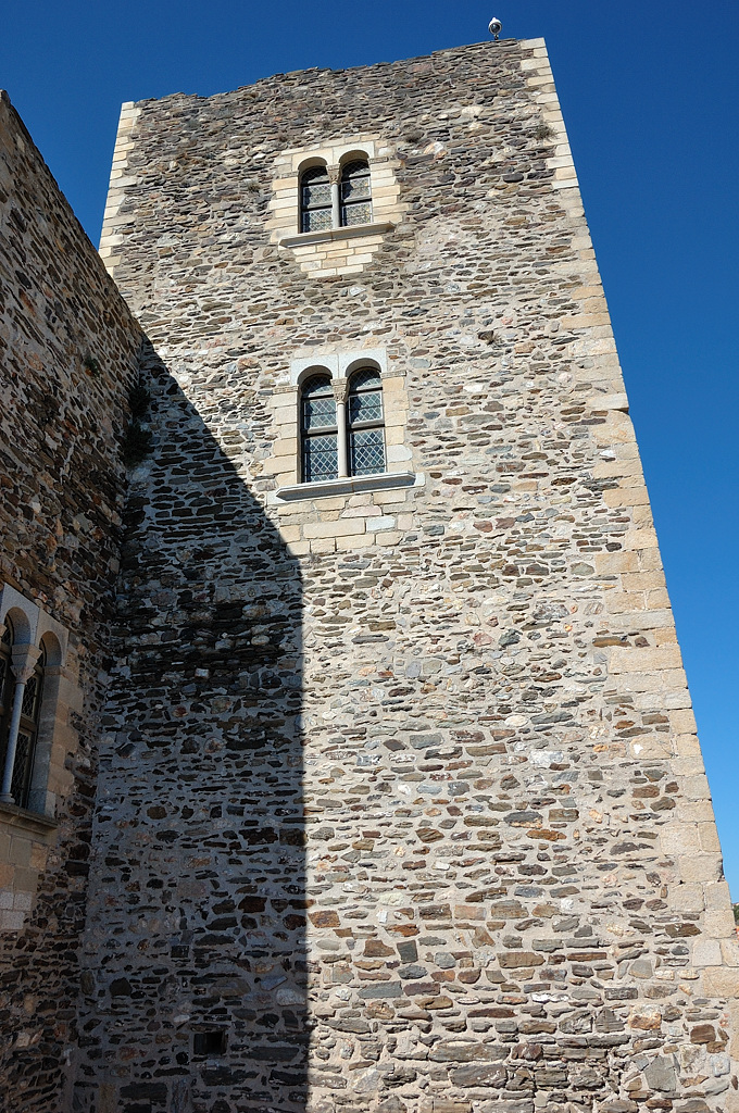 Château royal de Collioure